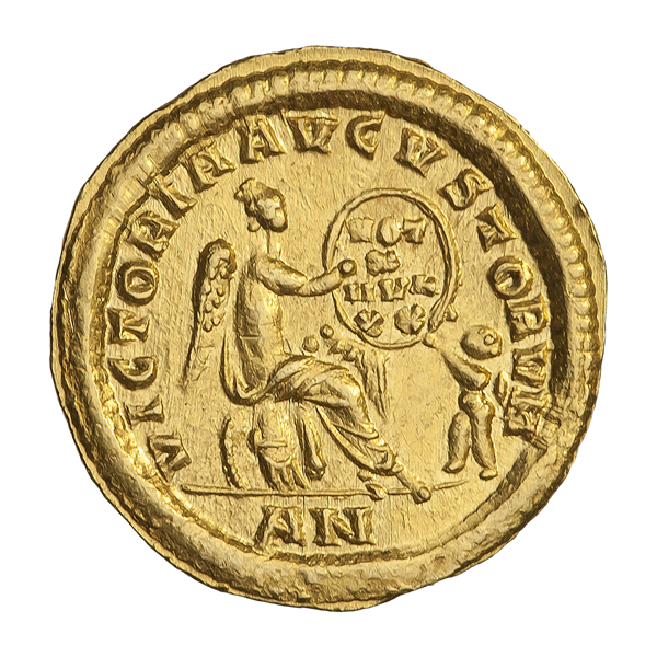 Семисс. Валент II. Ок. 367—375 гг. (реверс). Виктория сидит на трофеях, принимает от крылатого гения щит с надписью VOT X MVL XX.